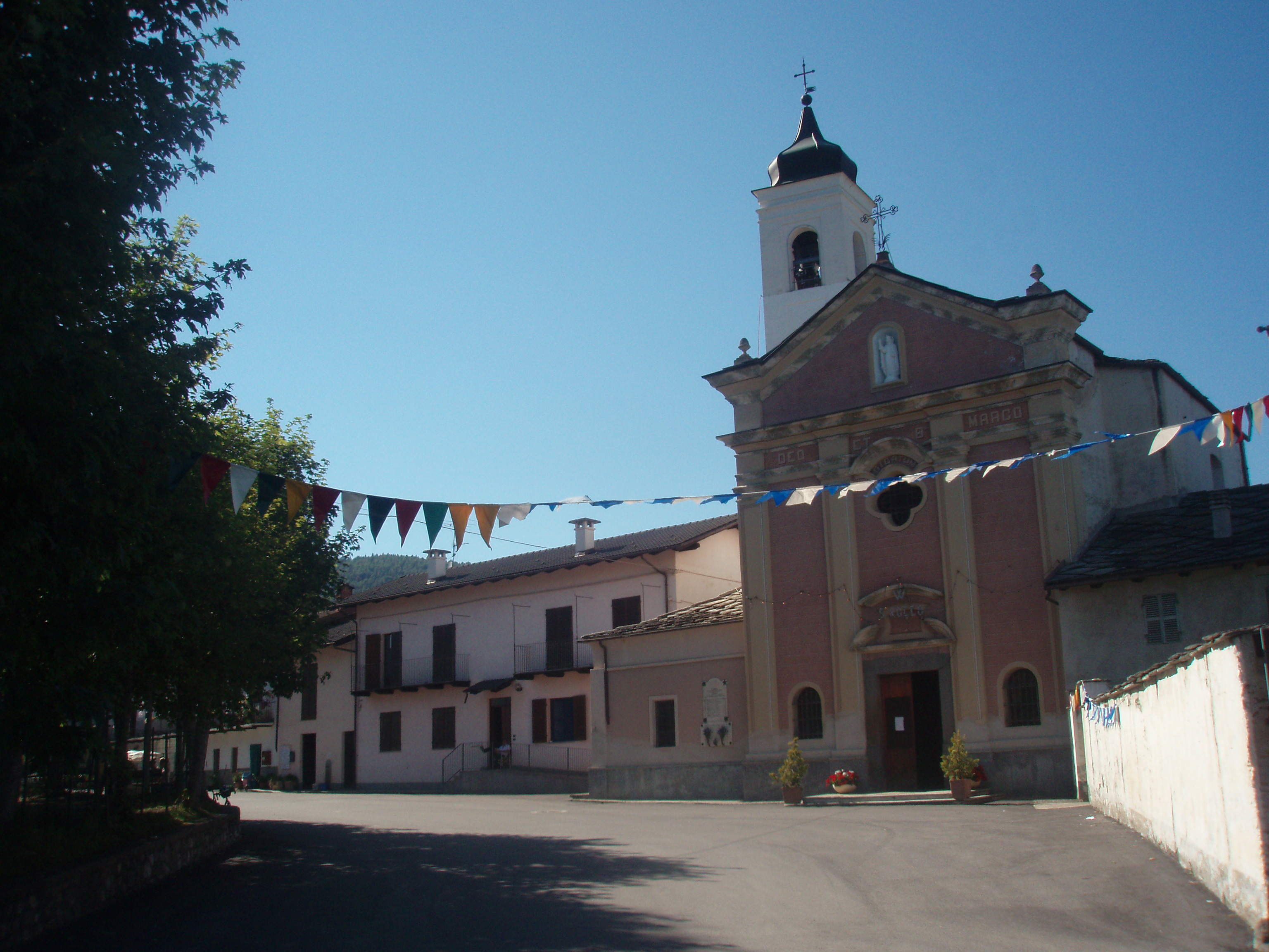 Photo que j'ai prise le 20/08/2013